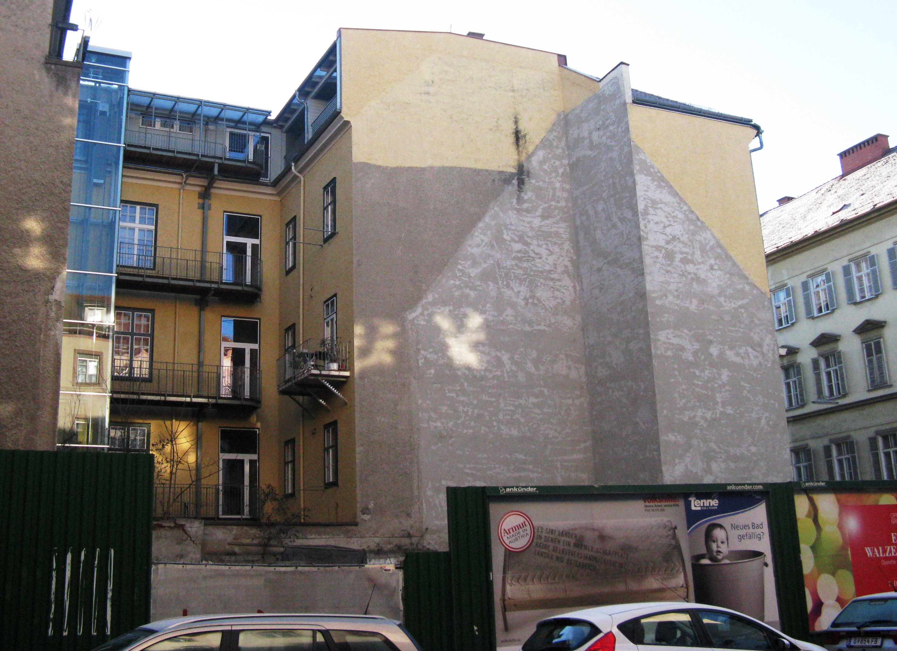 Die Abrissstelle des Kommod-Hauses an der Ecke Einspinnergasse/Burggasse. Die Silhouette ist noch eindeutig erkennbar.